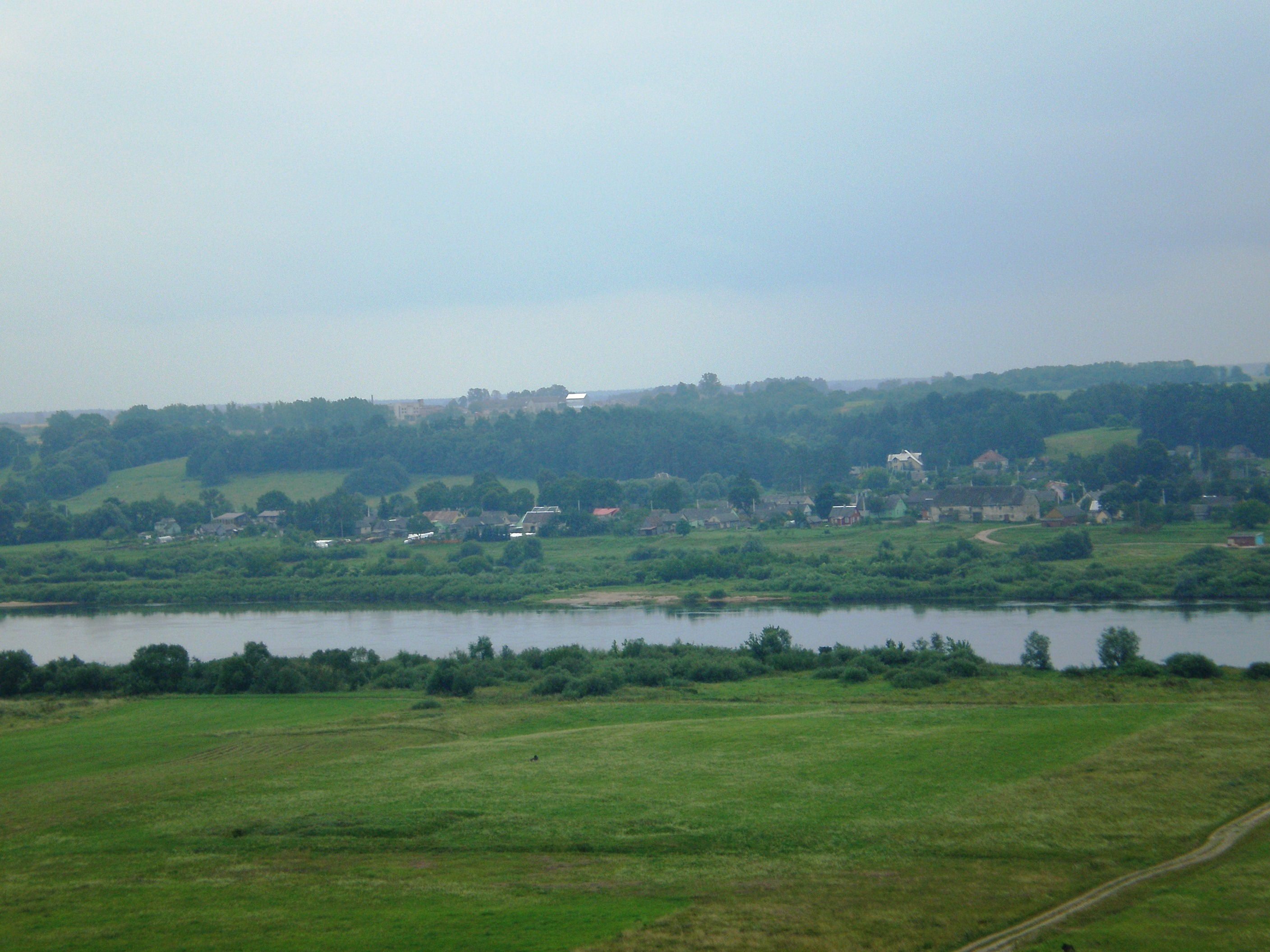 Kriūkai, Šakiai dst.